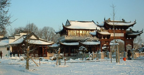 chinesisches Teehaus im Luisenpark Mannheim.